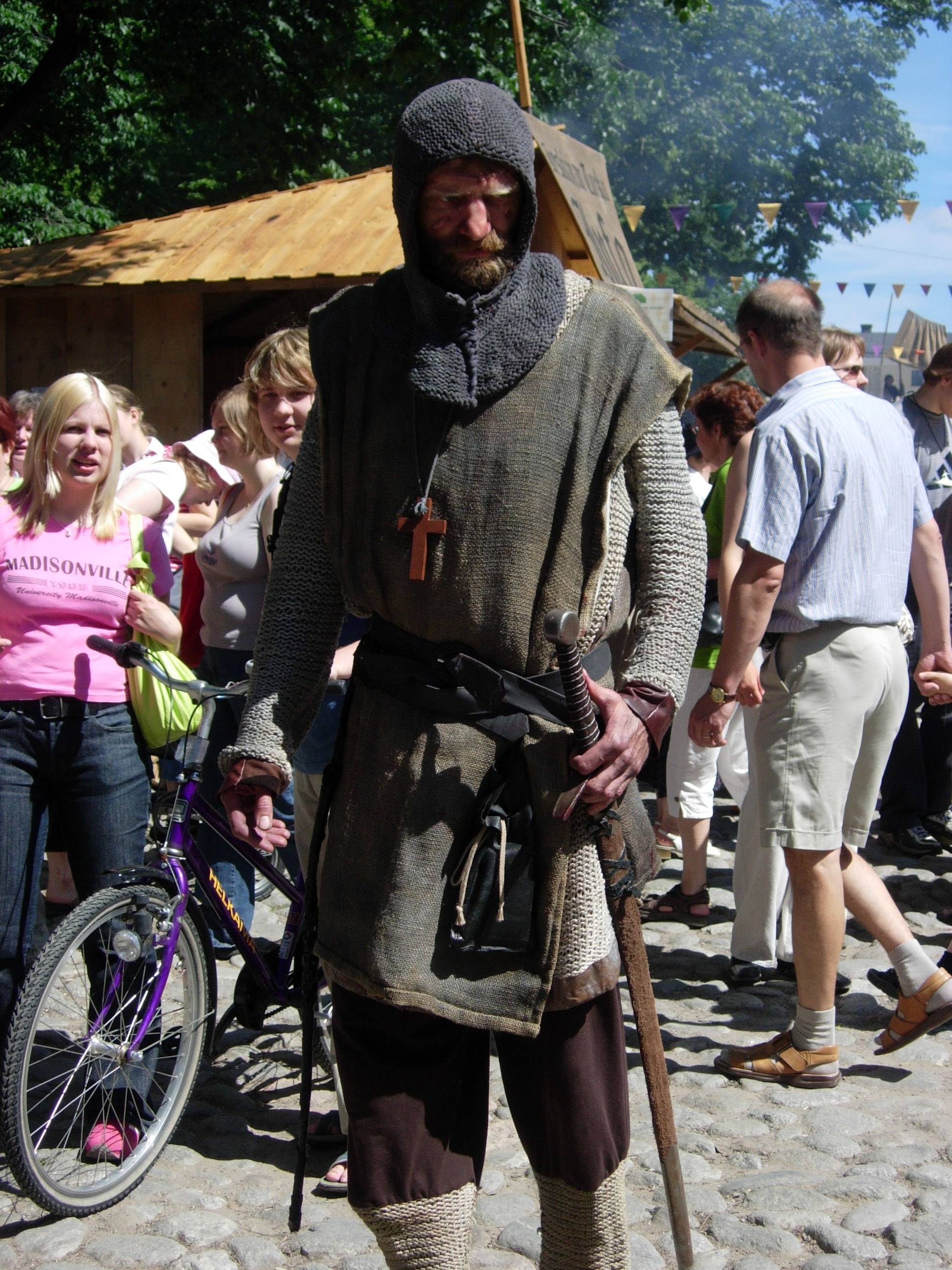 Turku Medieval Market 2005.